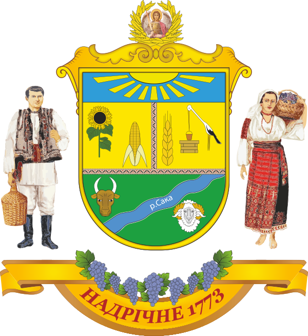 Герб села Надрічне (Тарутинський район)